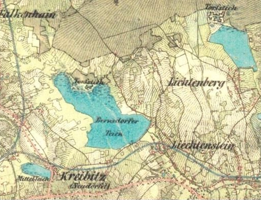 Okolí Velkého rybníka - II. vojenské mapování